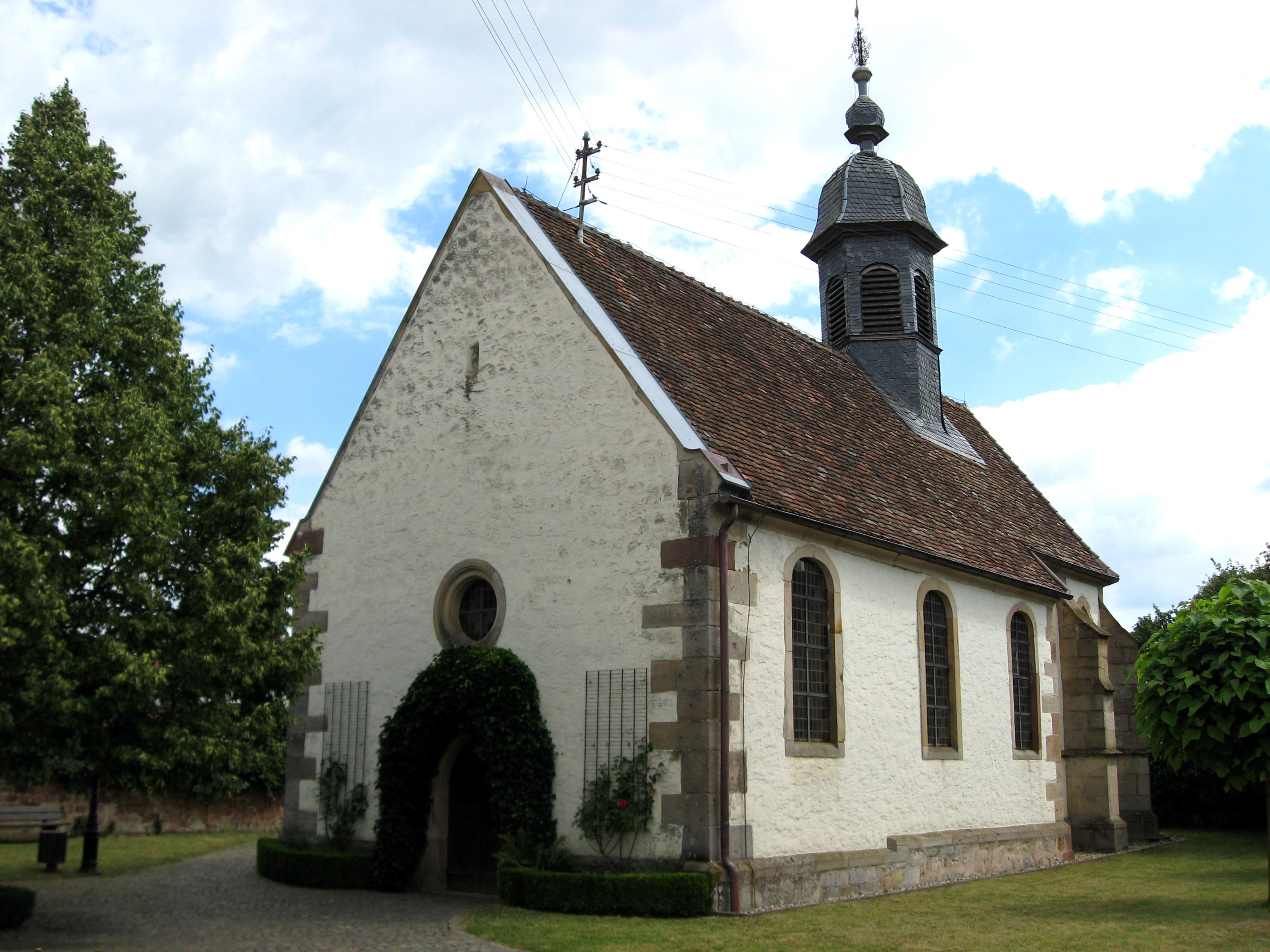 Protestantische Kirche Kirchgasse 5 in Dierbach, ehemals St. Anna; spätgotischer Saalbau, Anfang des 16. Jahrhunderts